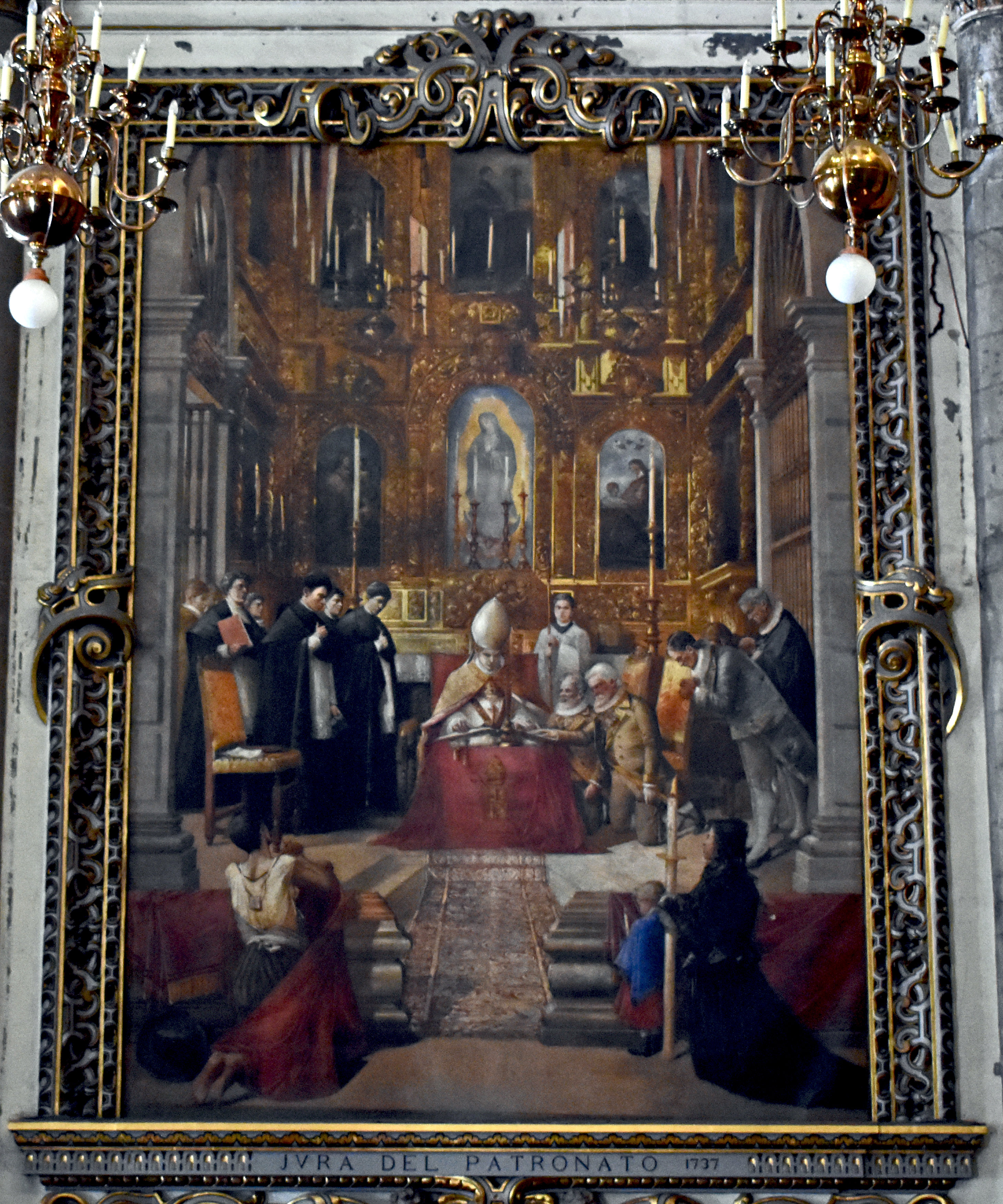 Pintura titulada "Jura del patronato 1737". Autor Felix Parra. Óleo sobre tela, 5.20 x 8.00 m. Interior de la Antigua Basílica de Guadalupe. Conjunto Villa de Guadalupe